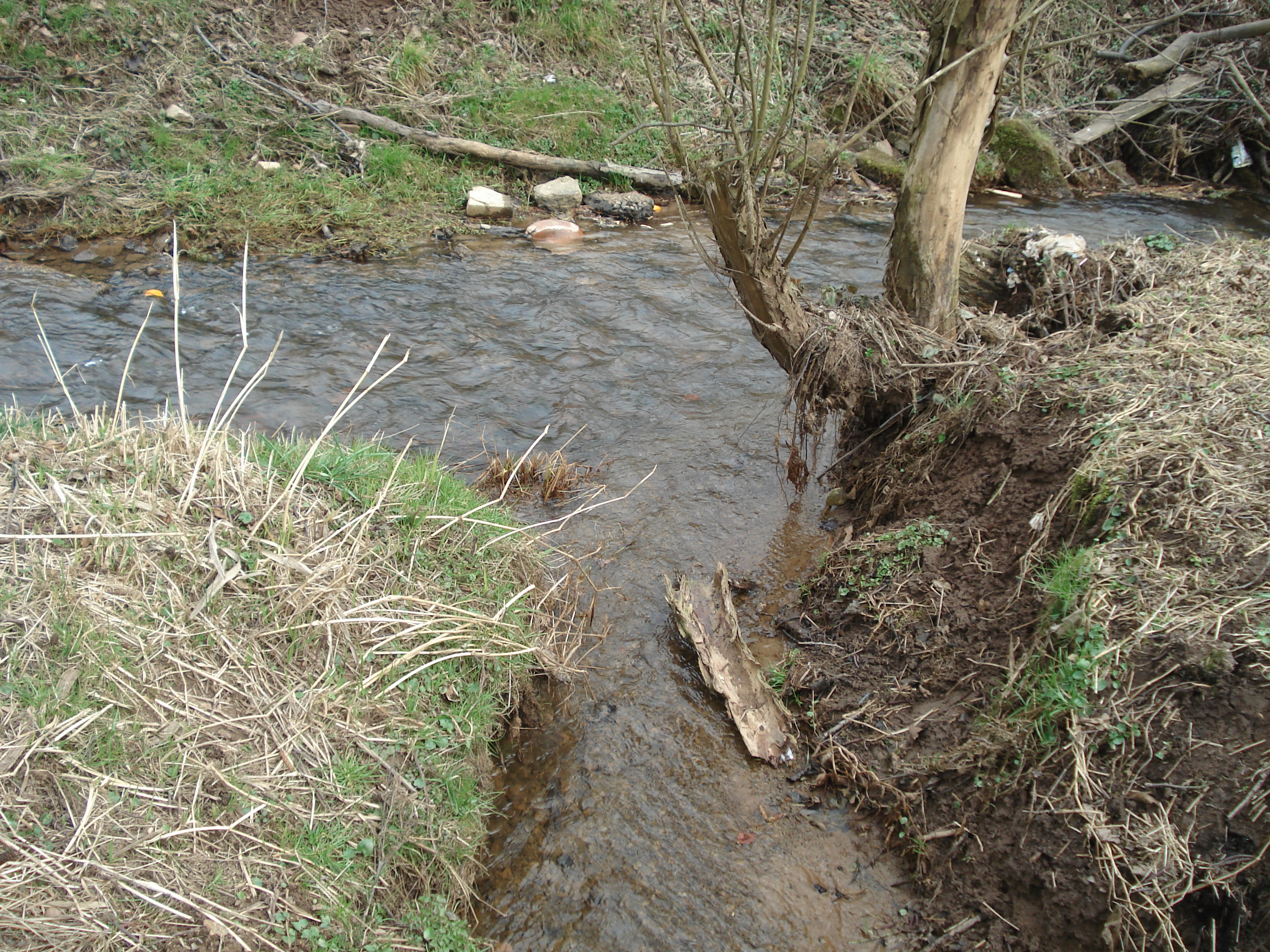 Der Dörnsenbach mündet in den Westerbach